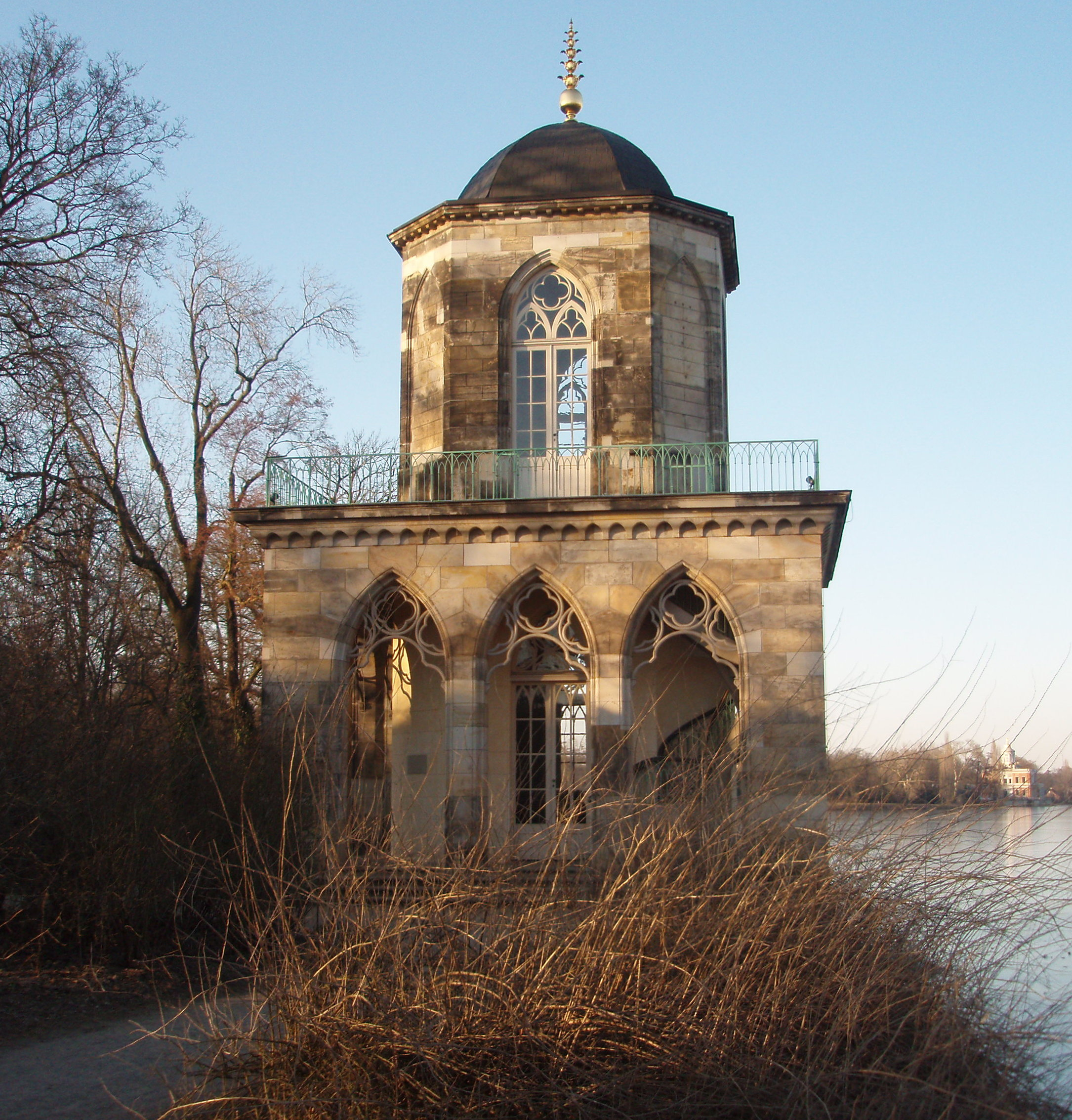 Potsdam, Neuer Garten, Gotische Bibliothek